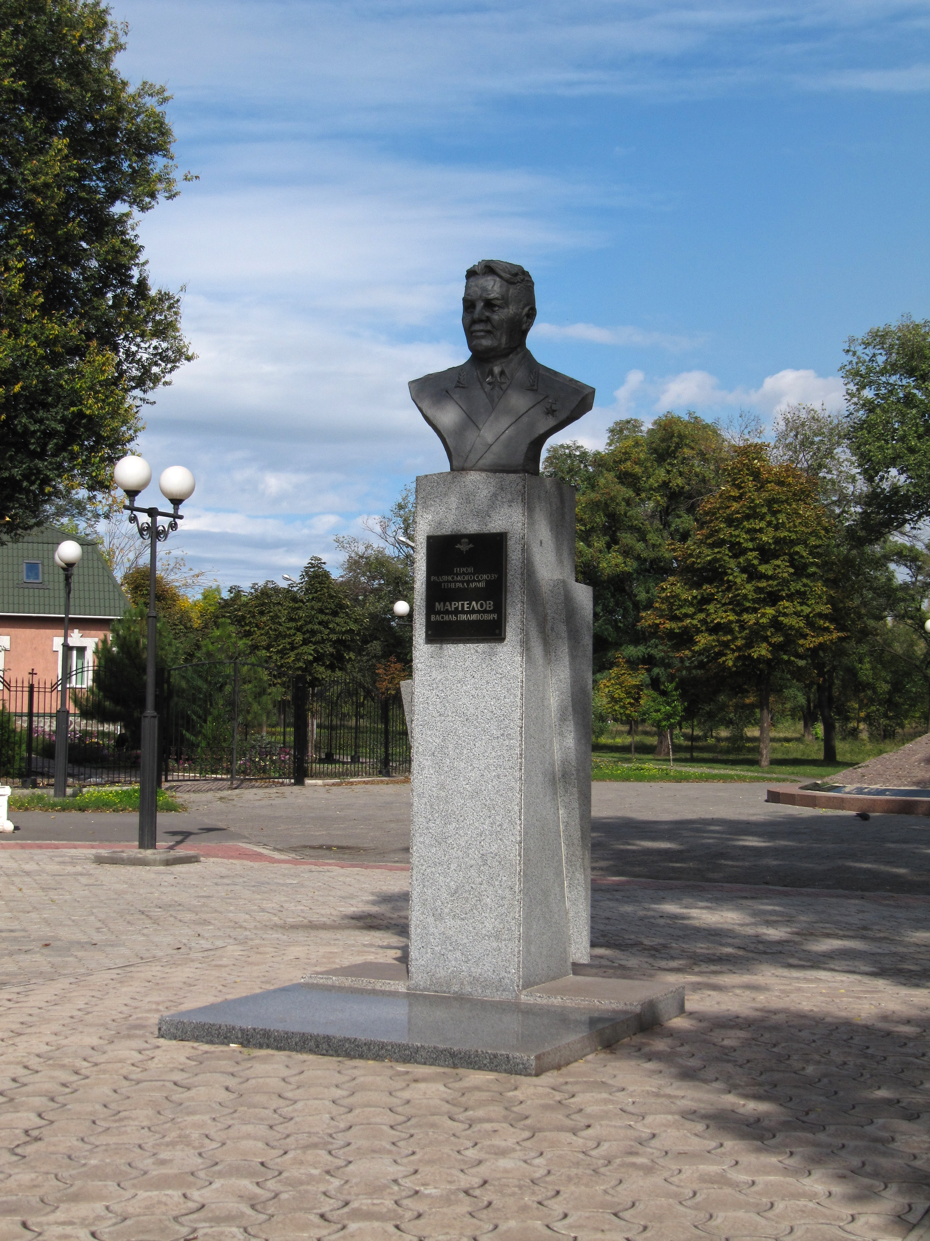 Пам’ятник Маргелову В.П., Герою Радянського Союзу, генералу.